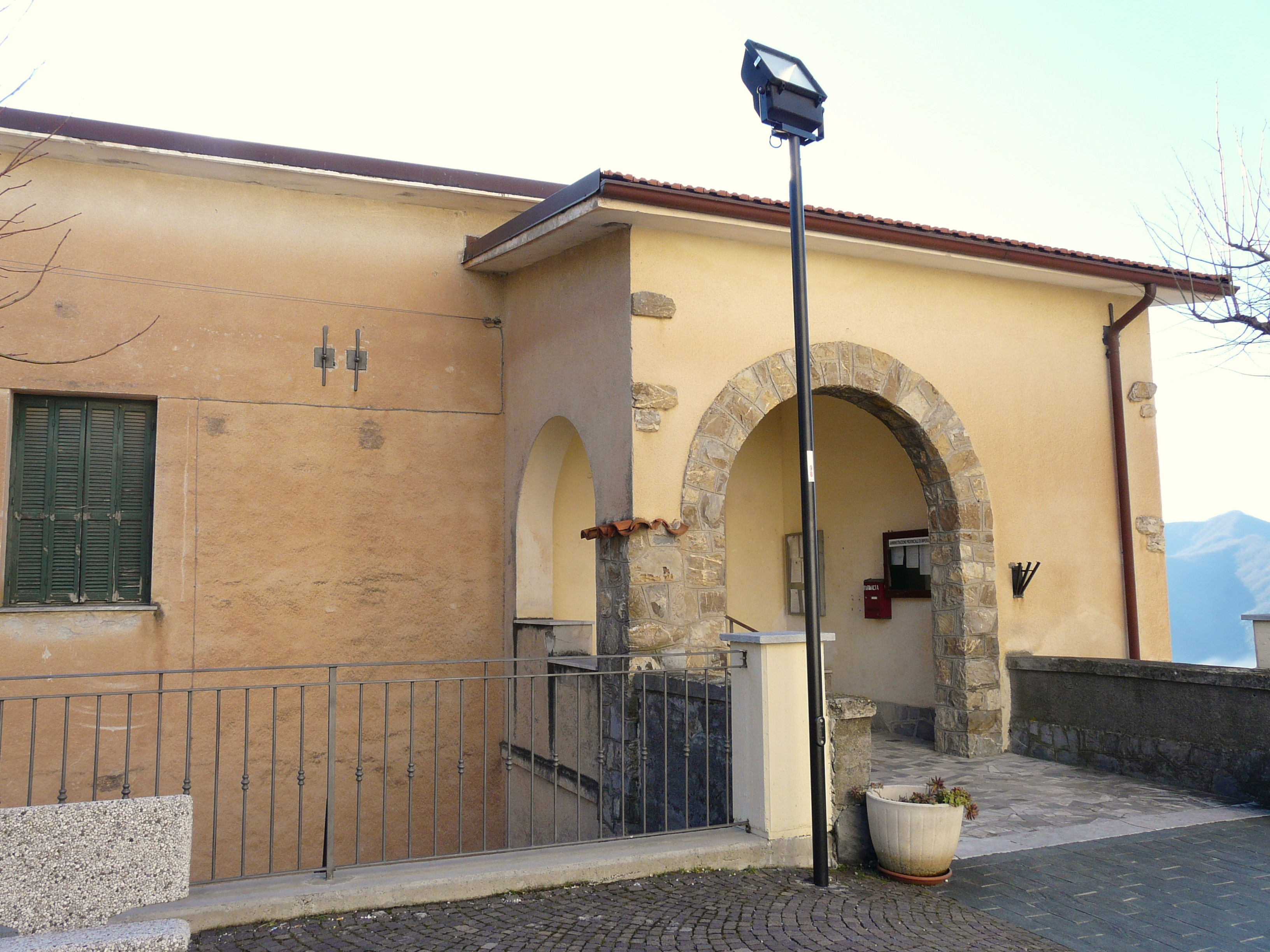 Municipio di Aquila d'Arroscia, Liguria, Italia